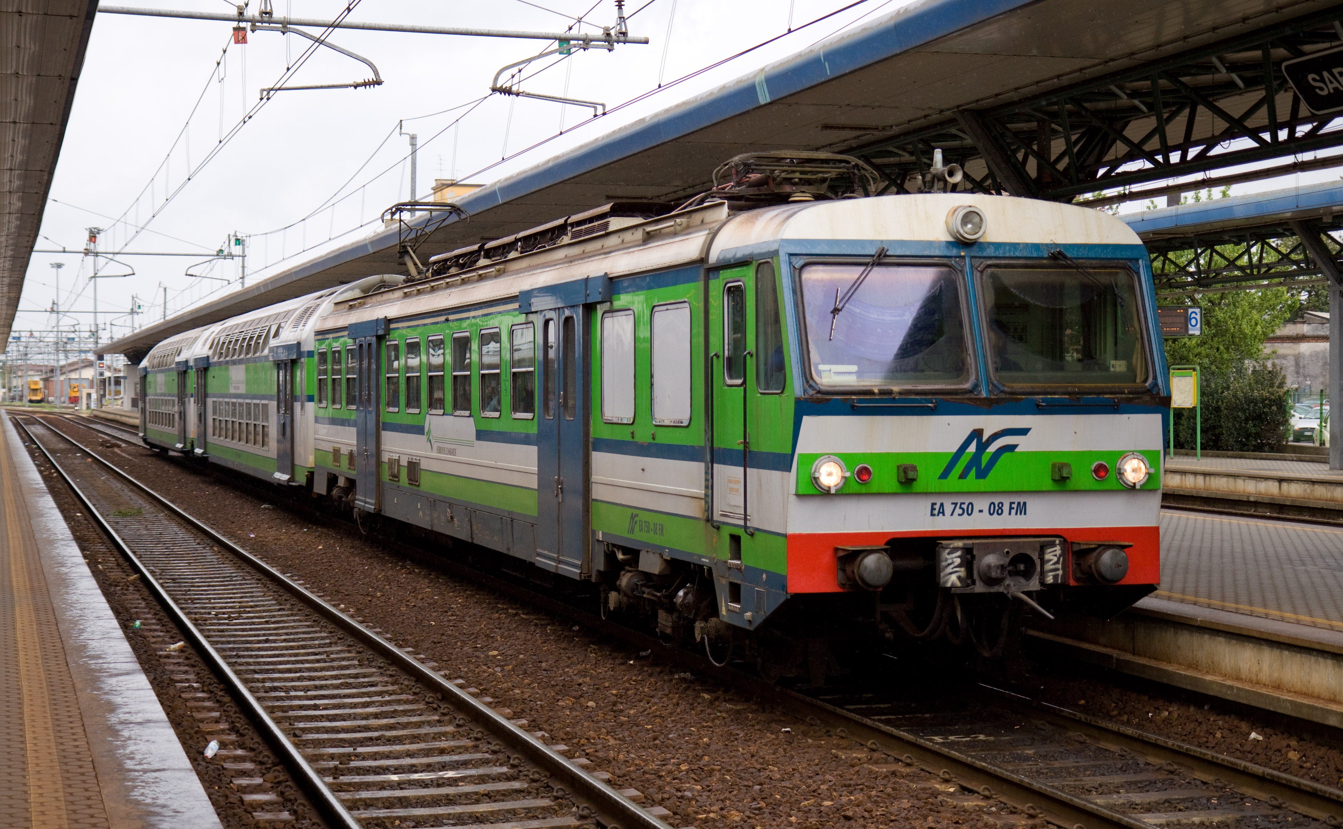 Automotrice E.750 di prima serie delle FNM in sosta a Saronno.